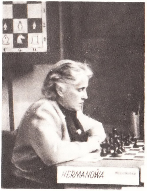 Róża Maria Herman (ur. 16 stycznia 1902 w Łodzi, zm. 7 marca 1995 w Łodzi) – czołowa polska szachistka w okresie międzywojennym oraz powojennym żydowskiego pochodzenia.